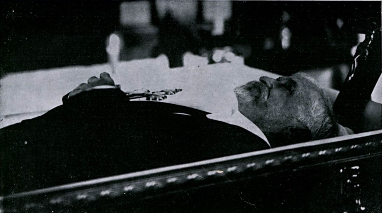 Velório do presidente Afonso Pena.